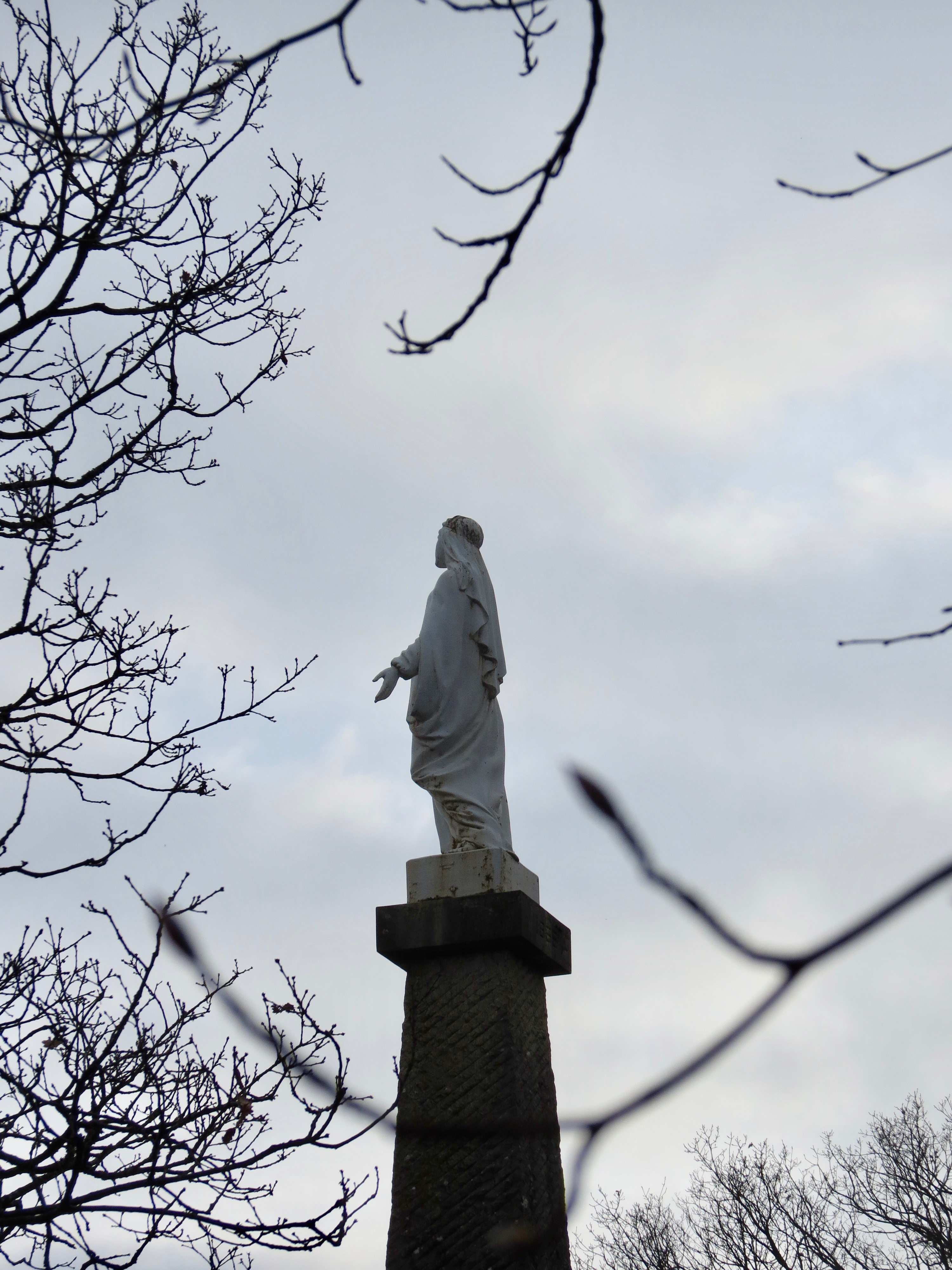 Statue de la Vierge de Lacoux, Ain, France.